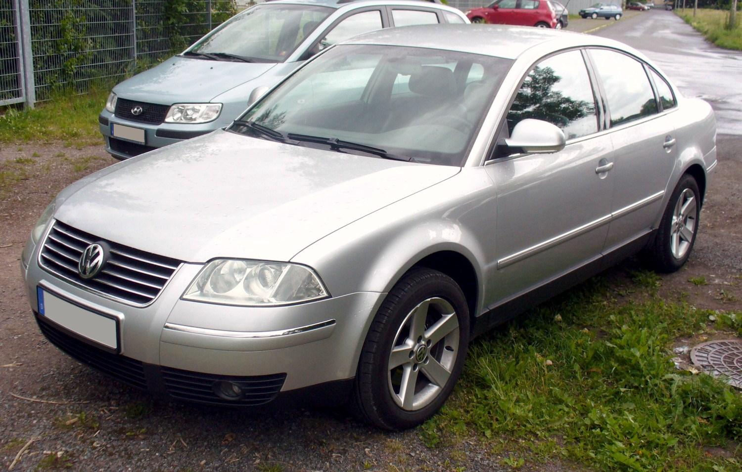 VW Passat B5